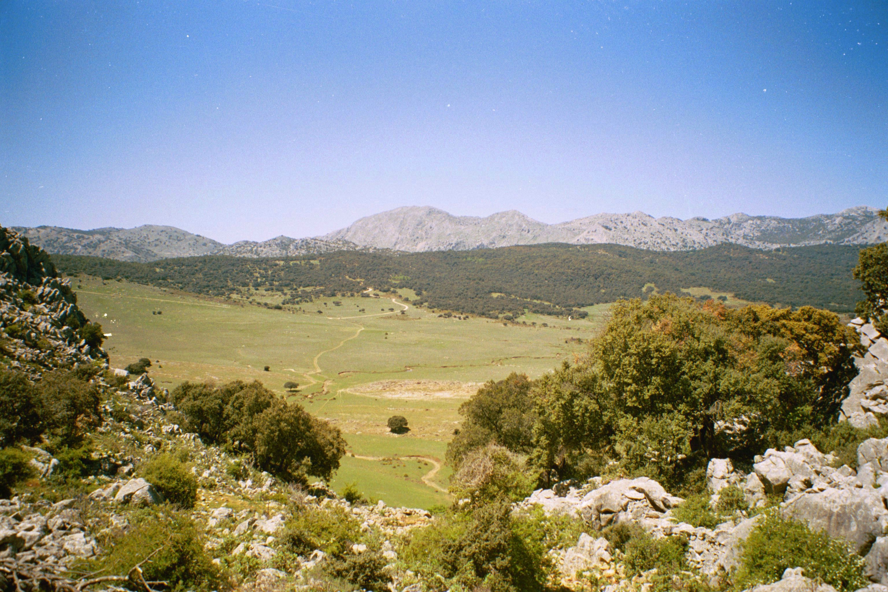 LlanosRepublicano.jpg